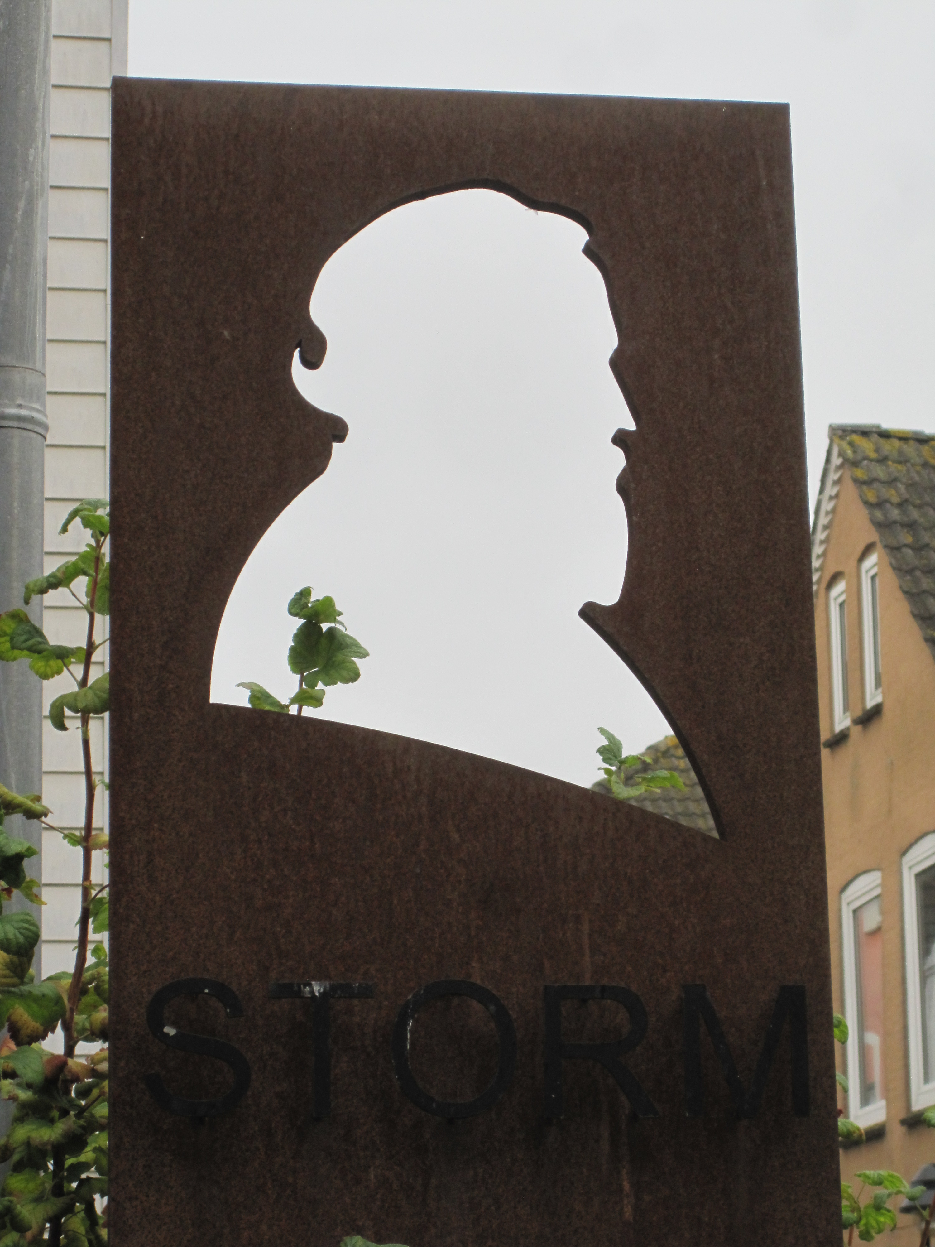 Husum: Vor dem Theodor-Storm-Haus steht diese Plastik, die Silhouette des Dichters zeigend.